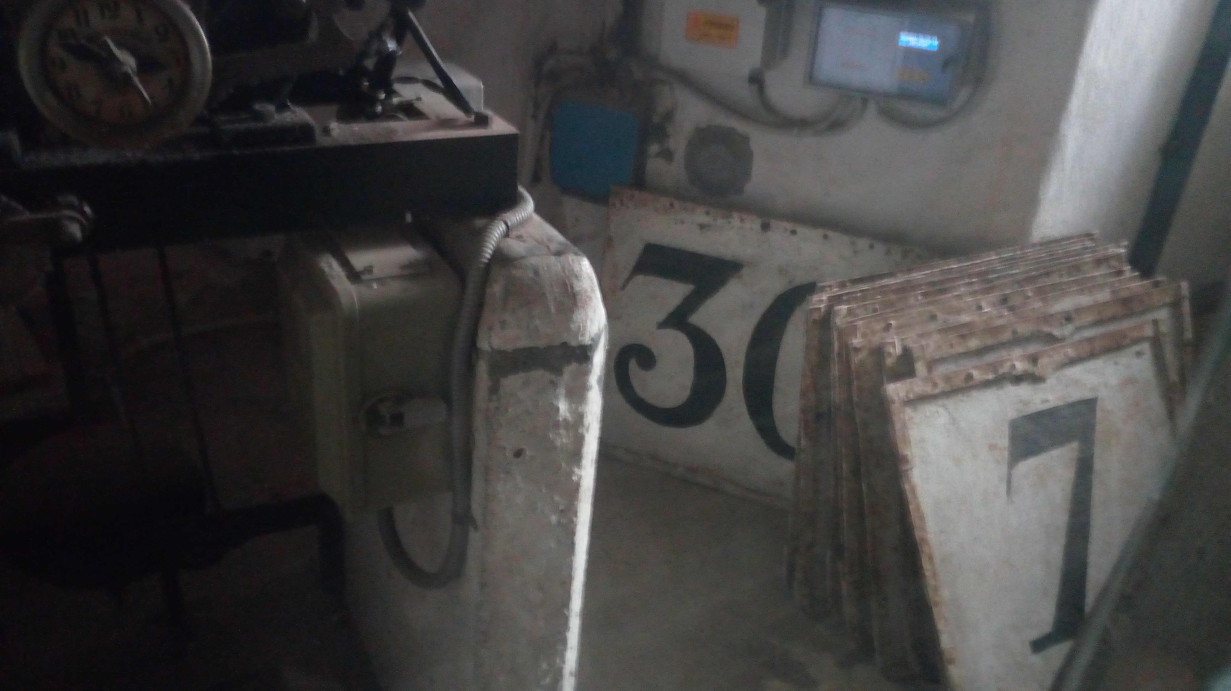 Dettaglio sui numeri utilizzati per segnalare il giorno corrente nell'orologio della Torre del Mangia a Siena. Essi vengono posti manualmente in un foro quadrato sul quadrante dell'orologio. Nell'angolo superiore a sinistra è presente il vecchio sistema che regolava l'orologio, mentre a destra è presente l'attuale sistema elettronico.